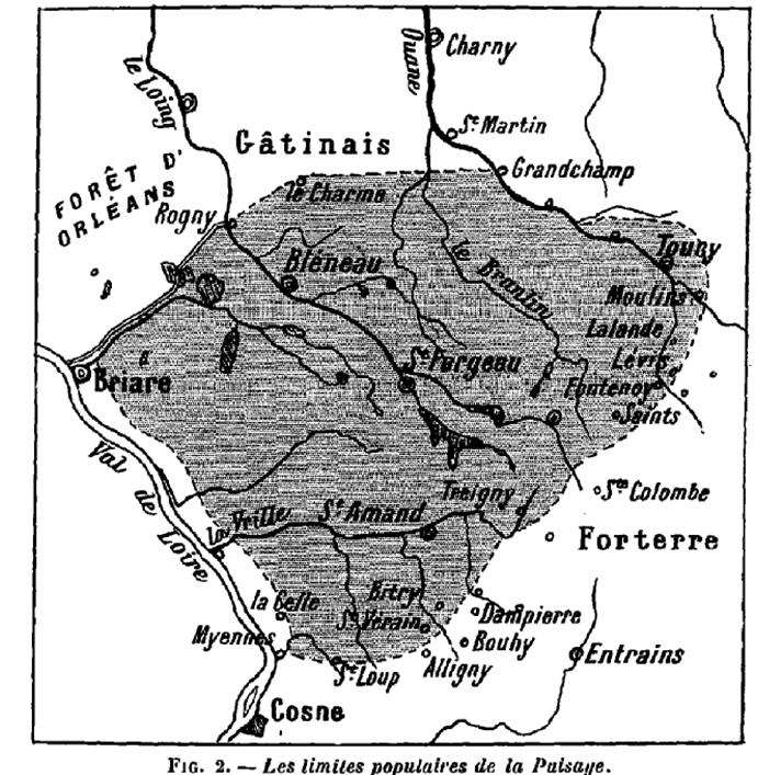 Carte de la région de Puisaye en France